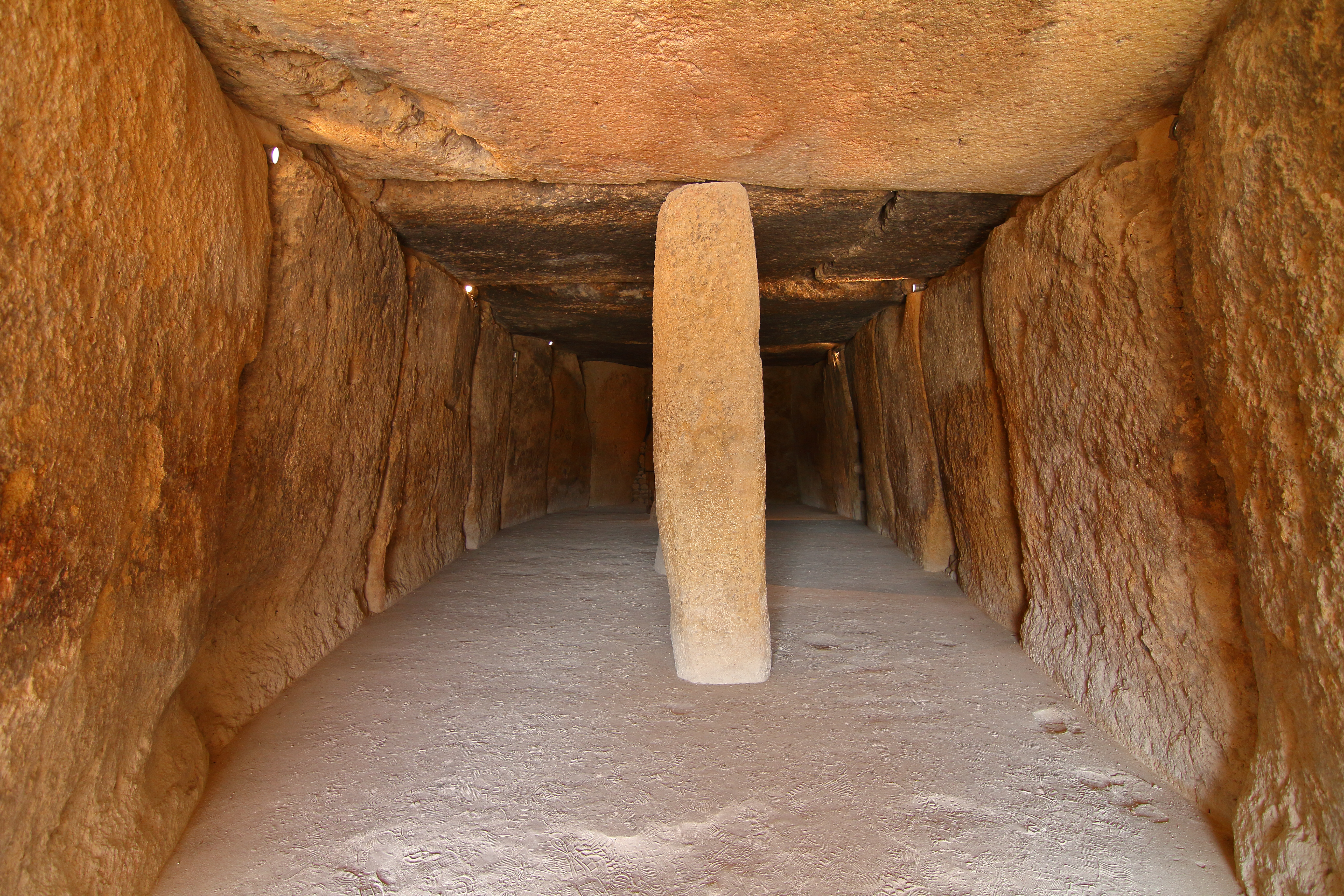 Dolmen de Menga, vista interior desde la entrada